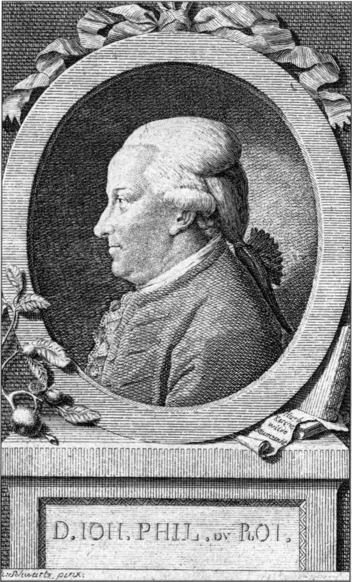 Johann Philipp du Roi (1741-1785); Kupferstich / copper engraving 1780